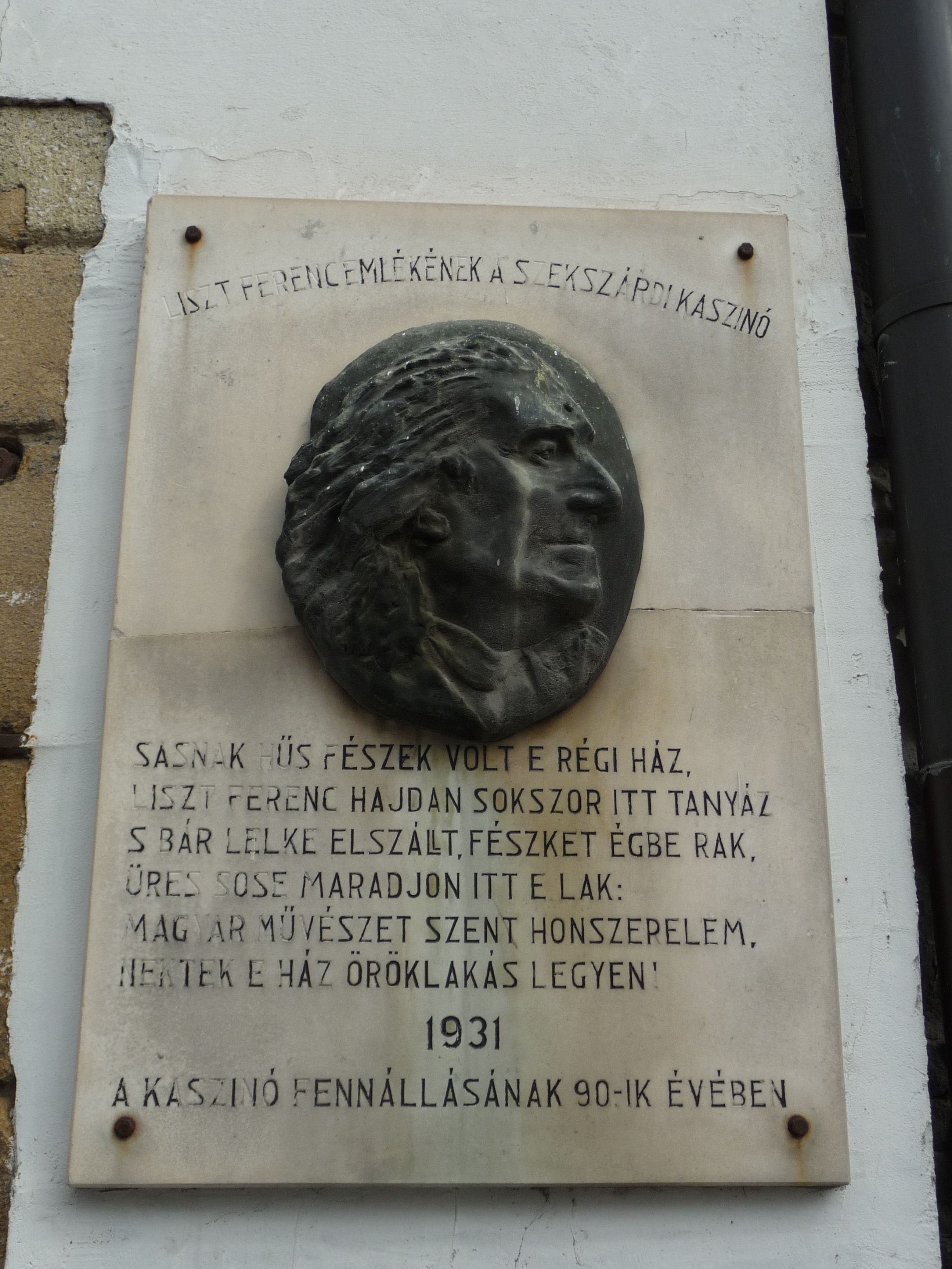 Liszt Ferenc emléktáblája (Wigand Edit, 1931) az Augusz-ház falán, Szekszárd